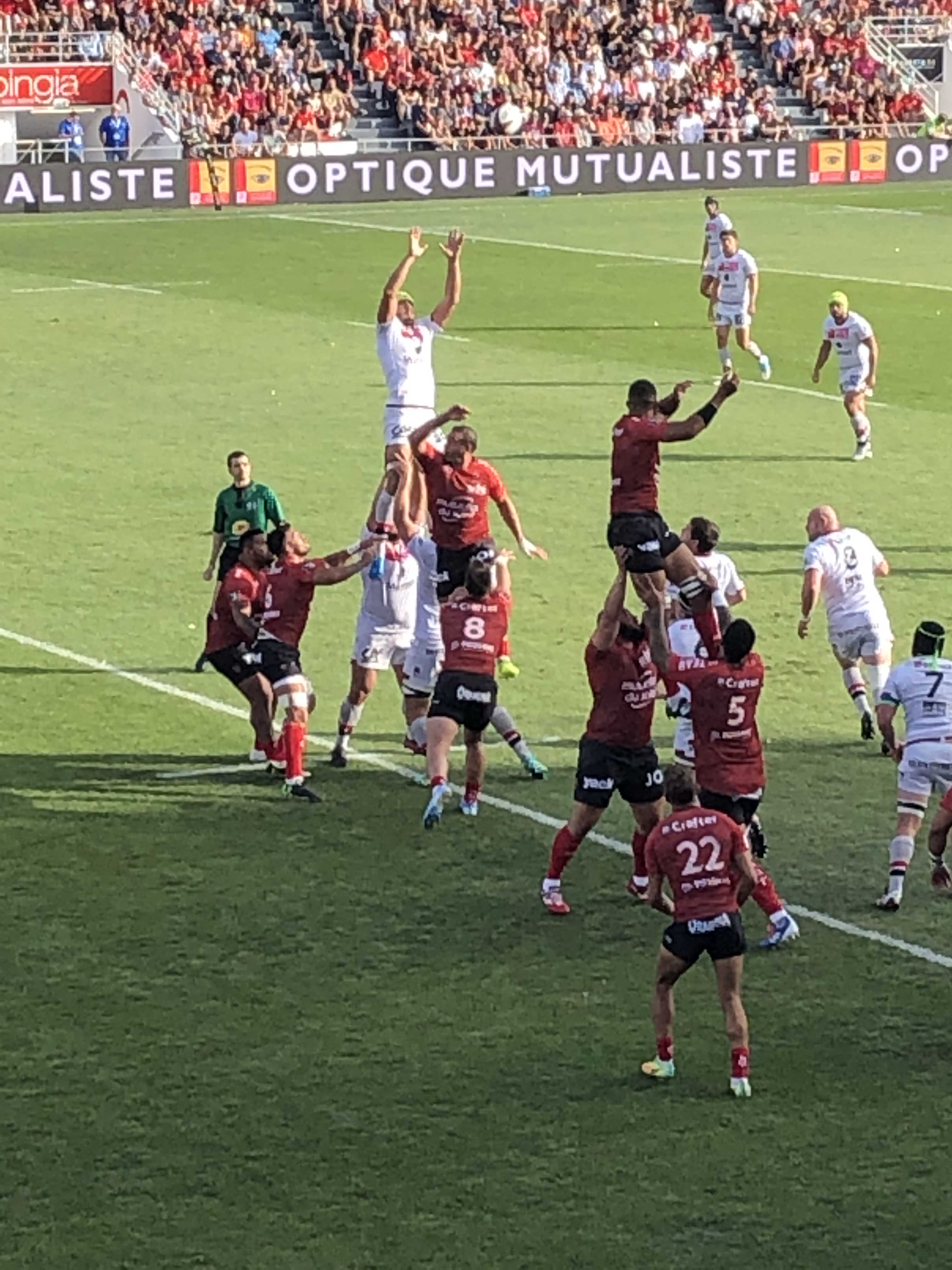 Virgile Bruni (casque jaune) jouant pour le LOU face au RCT le 07/09/2019